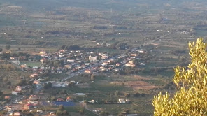 Νέο Σουλινάρι - φωτογραφία από Αϊ Λιά